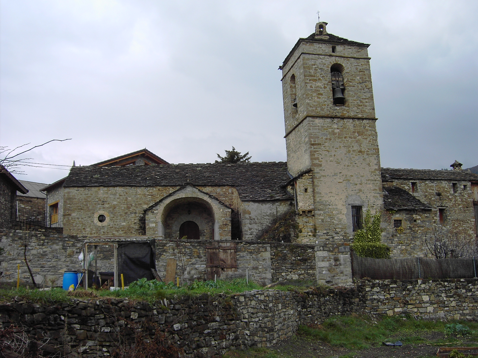 La iglesia de Buerba, en el Valle de Vió.